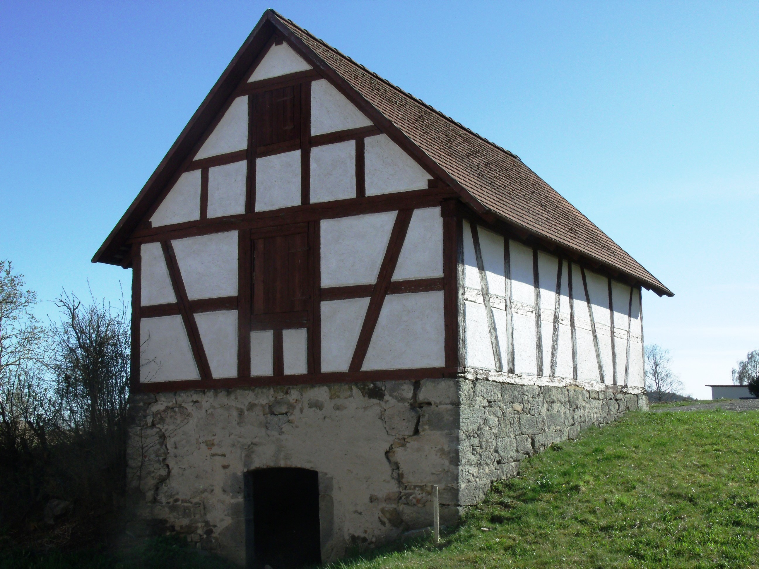 Sachsen bei Leutershausen, Kellerhaus des ehemaligen Brauereianwesens